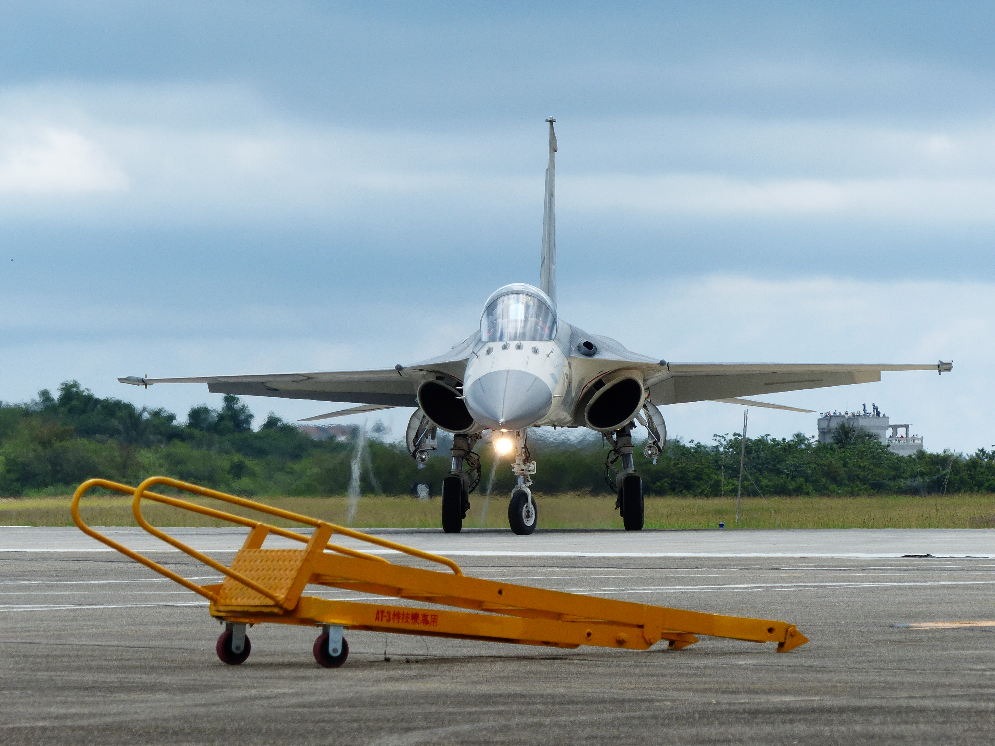 由空軍427聯隊第7作戰隊周孟勳少校操縱的經國號F-CK-1A 1427完成戰技操演後，進入志航基地停機坪；前方是AT-3特技機專用登機梯。